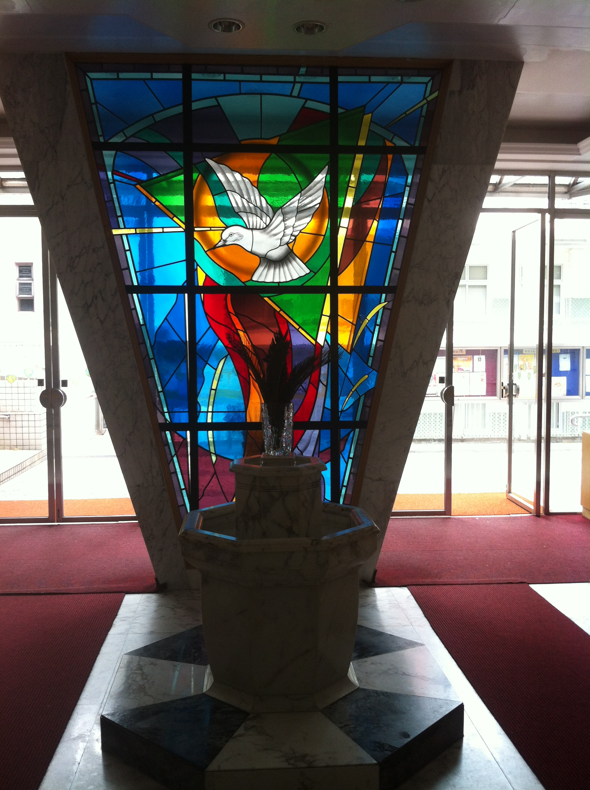 中文（香港）: 聖十字架堂聖洗池, 香港, 中國